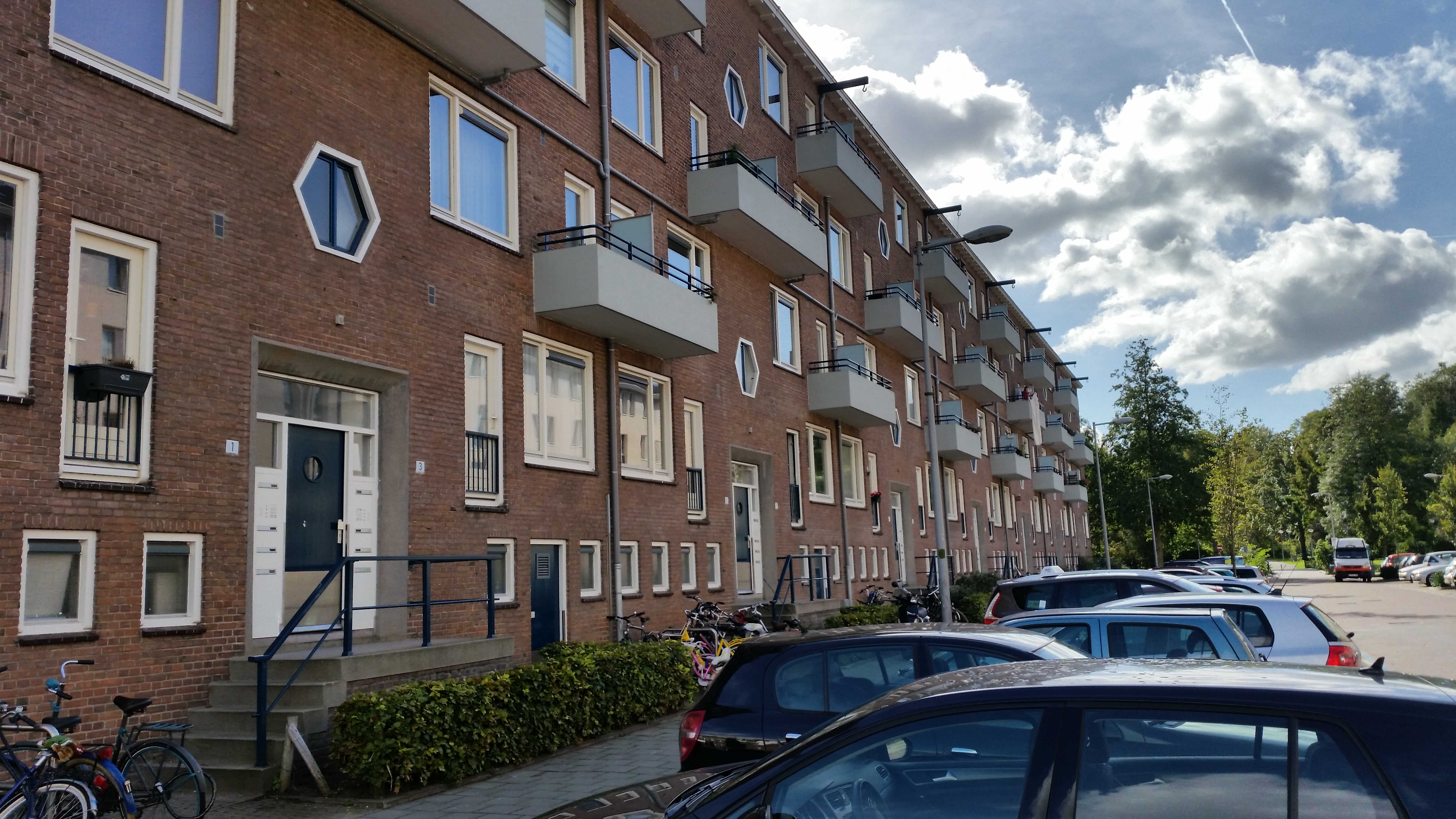 Freek Oxstraat, Amsterdam, oneven zijde